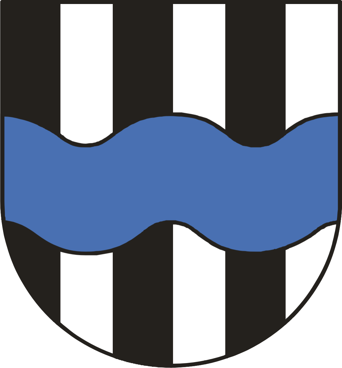 Herb gminy Chotcza